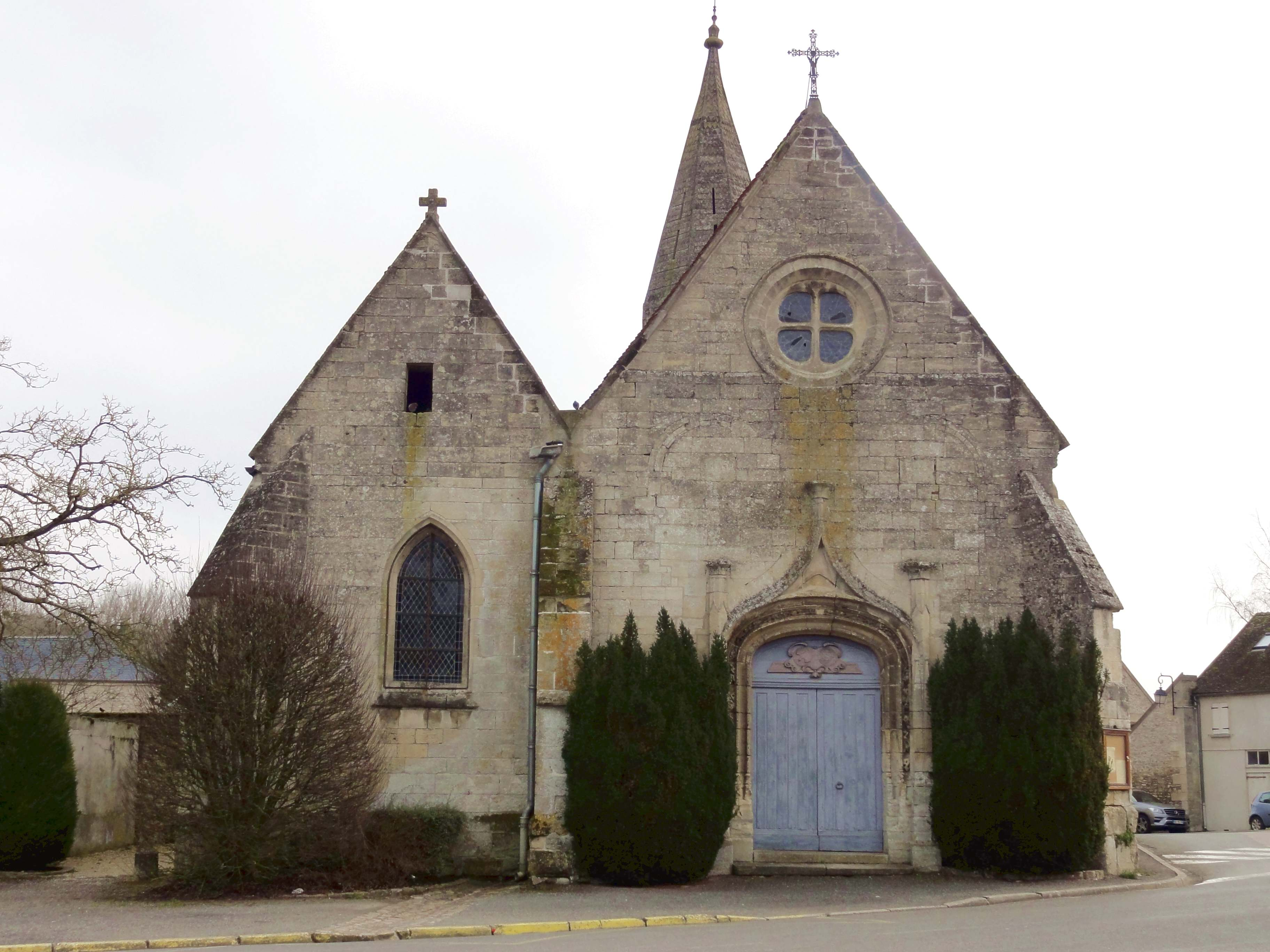 Voir titre.